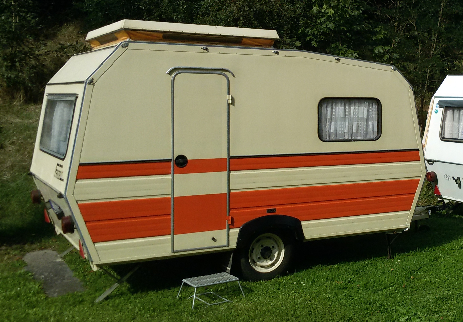 Friedel 2 - VEB Campinganhänger Großfahner, DDR